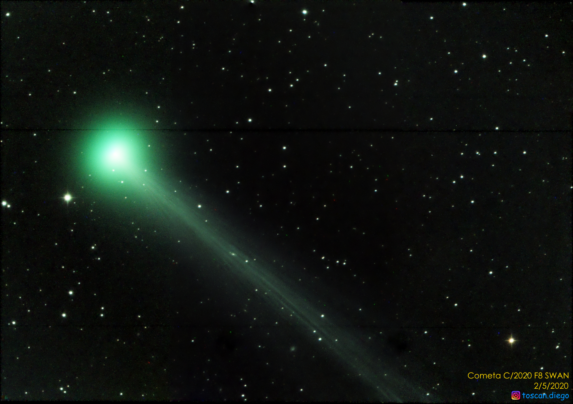 Foto del Cometa C/2020 F8 SWAN Tomada el 2 de Mayo de 2020